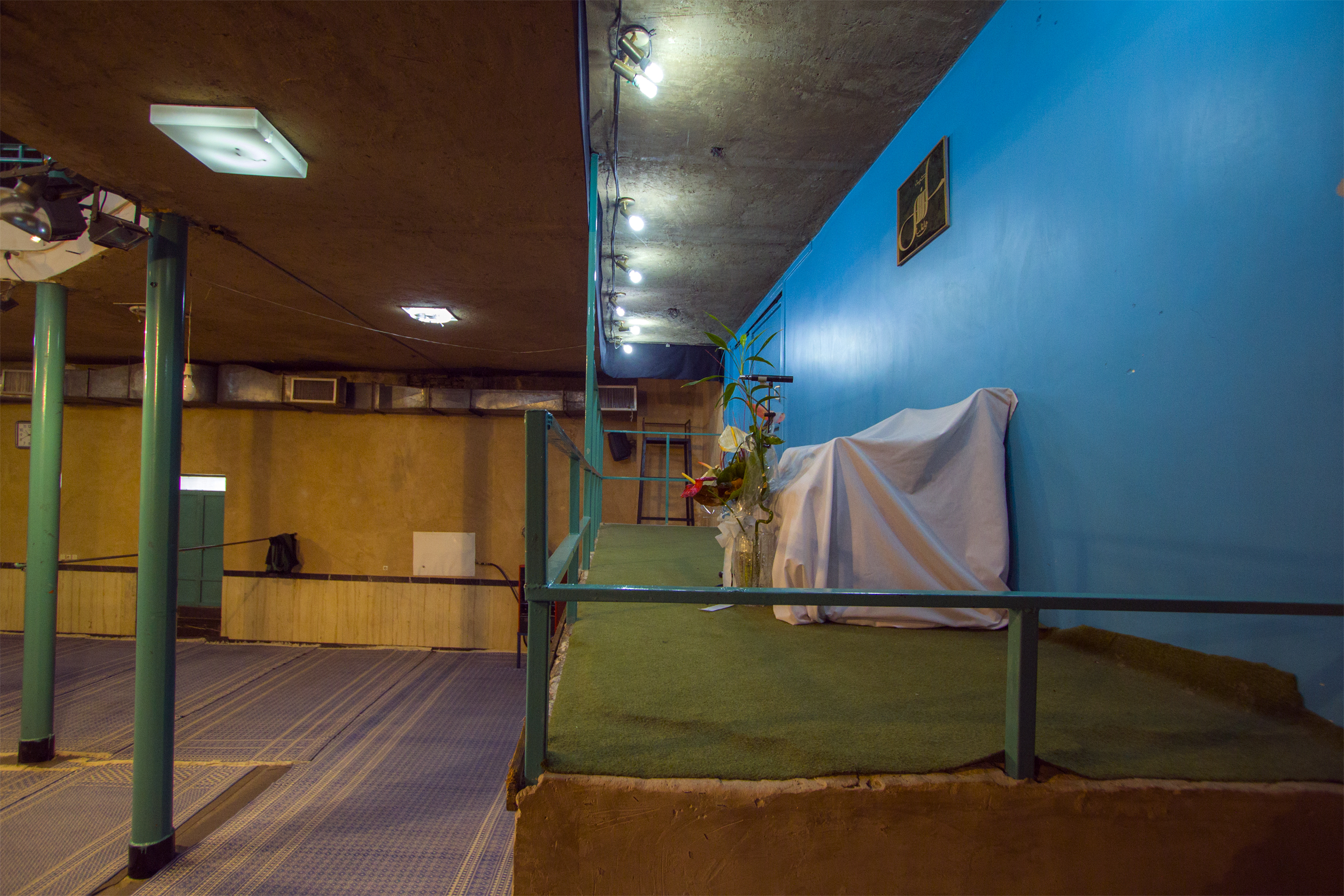 حسینیهٔ جماران حسینیه‌ای است در تهران واقع در کنار خانهٔ سید روح‌الله خمینی در جماران. سید روح‌الله خمینی سخنرانی‌های خود را از ۲۸ اردیبهشت ۱۳۵۹ در این حسینیه ایراد می‌کرد.